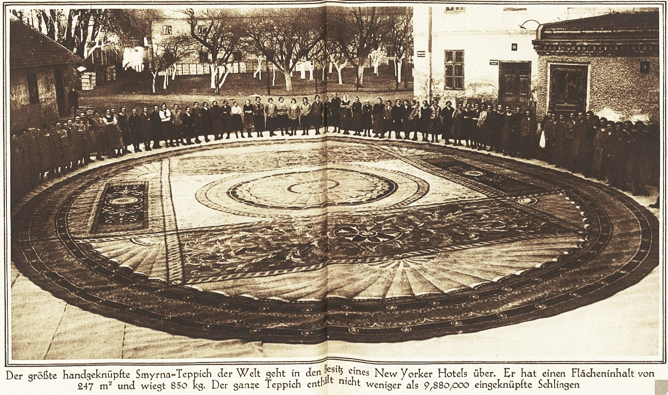 Smyrnateppich, 1925 in einem New Yorker Hotel.